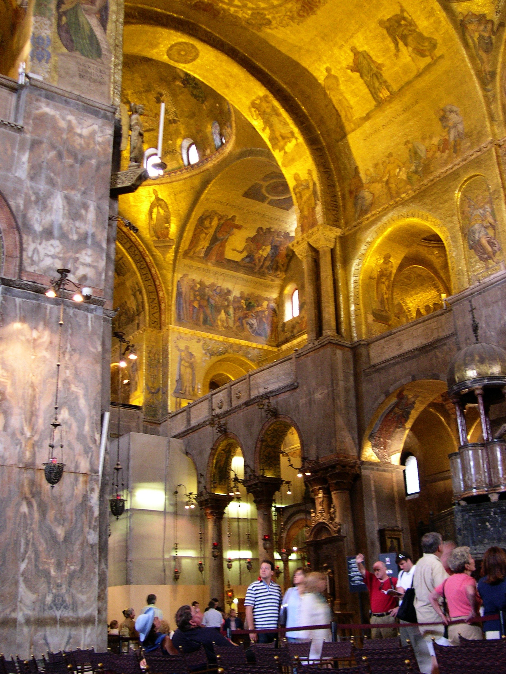 Basilique Saint Marc, intérieur